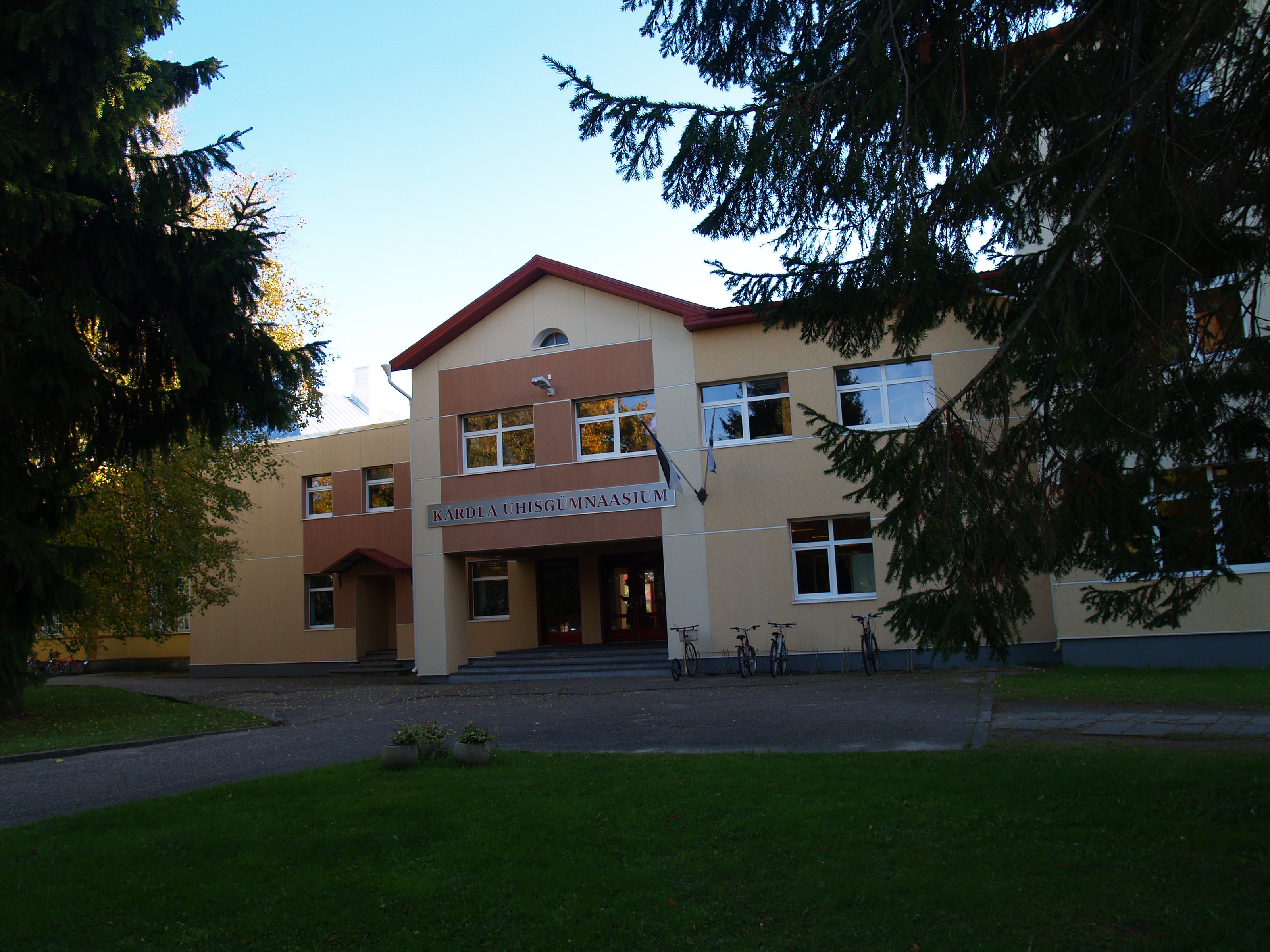 Kärdla Ühisgümnaasium